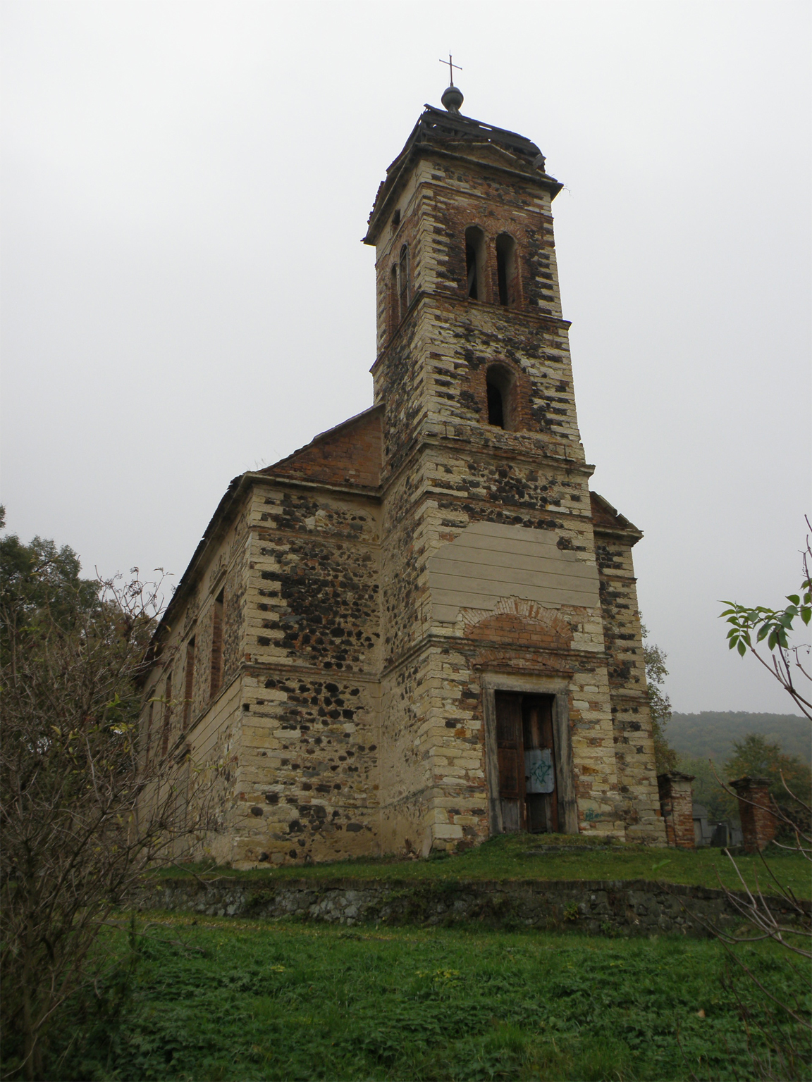 Kostel sv. Jakuba Většího, Mrzlice, okres Teplice (říjen 2011)